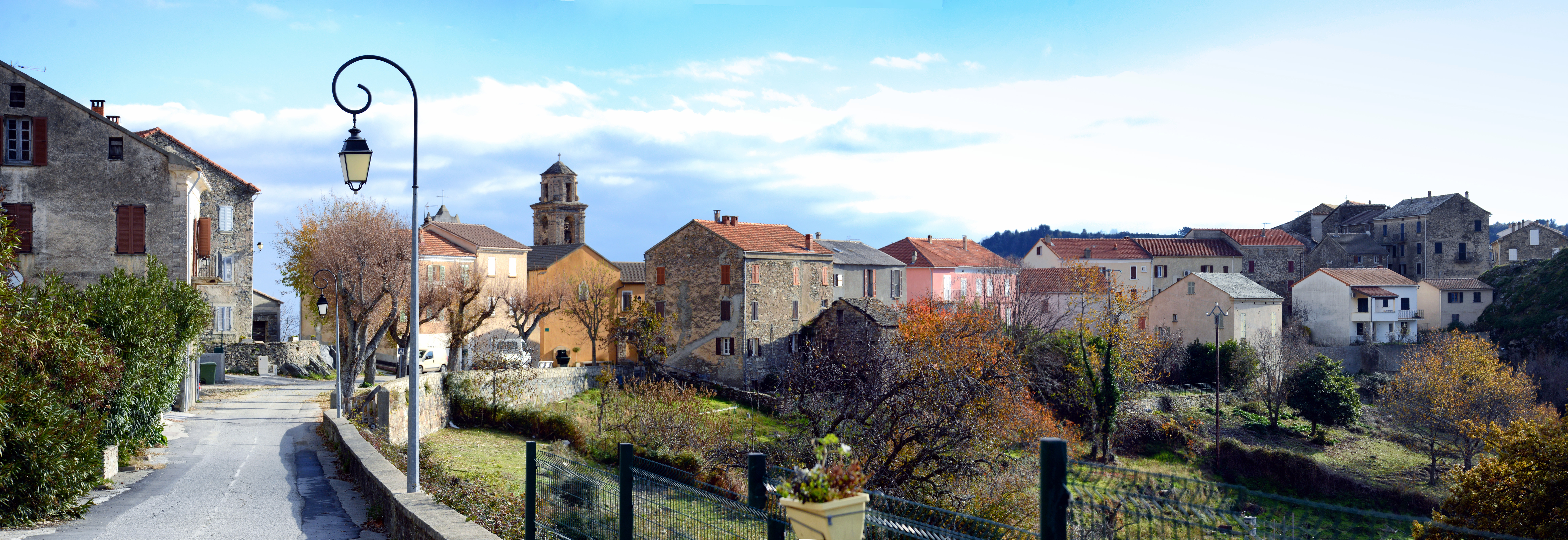 Pietraserena, Rogna (Corse) - Un village de l'extrême sud de la Castagniccia